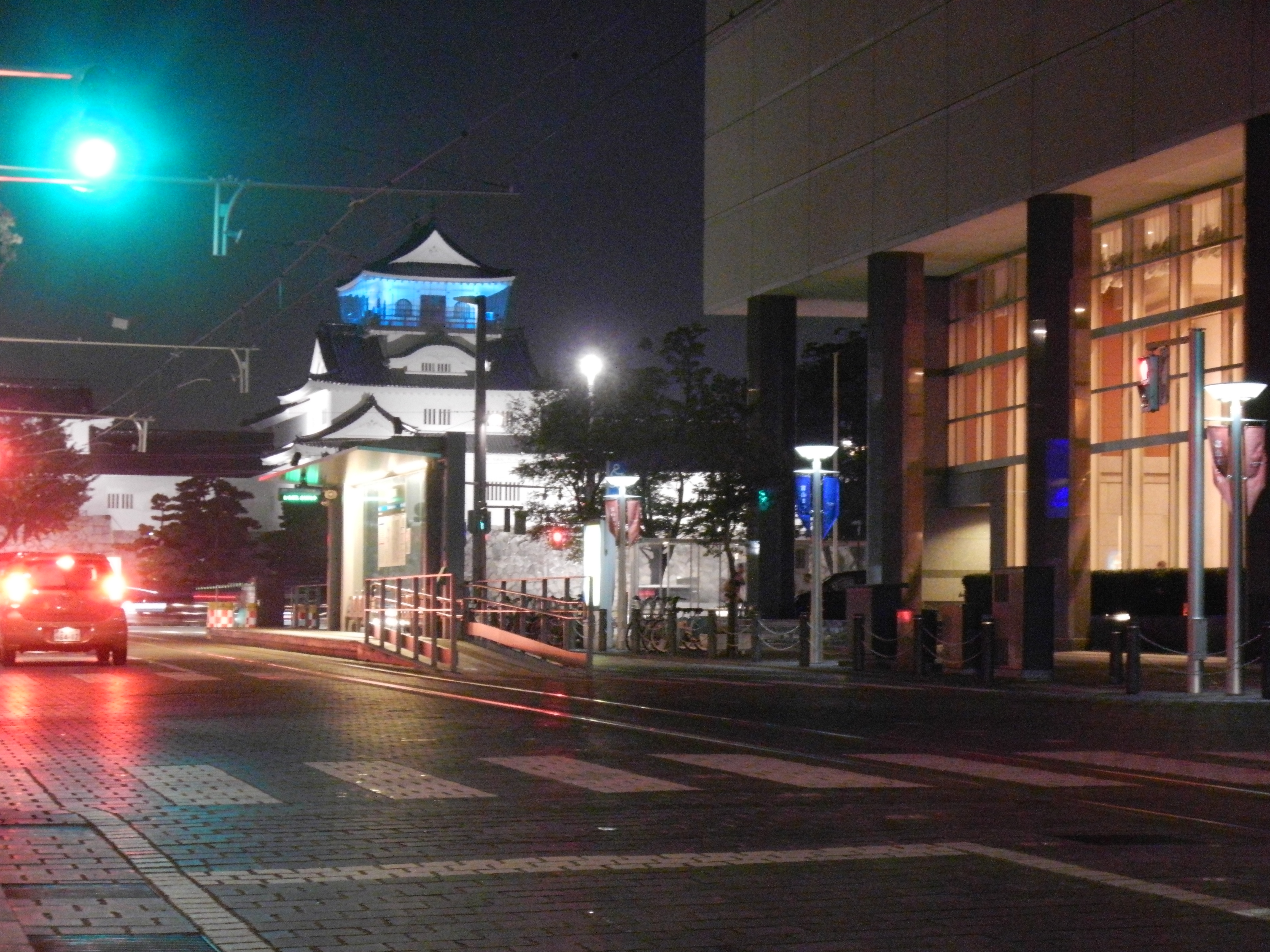 Toyama, Toyama Prefecture, Japan